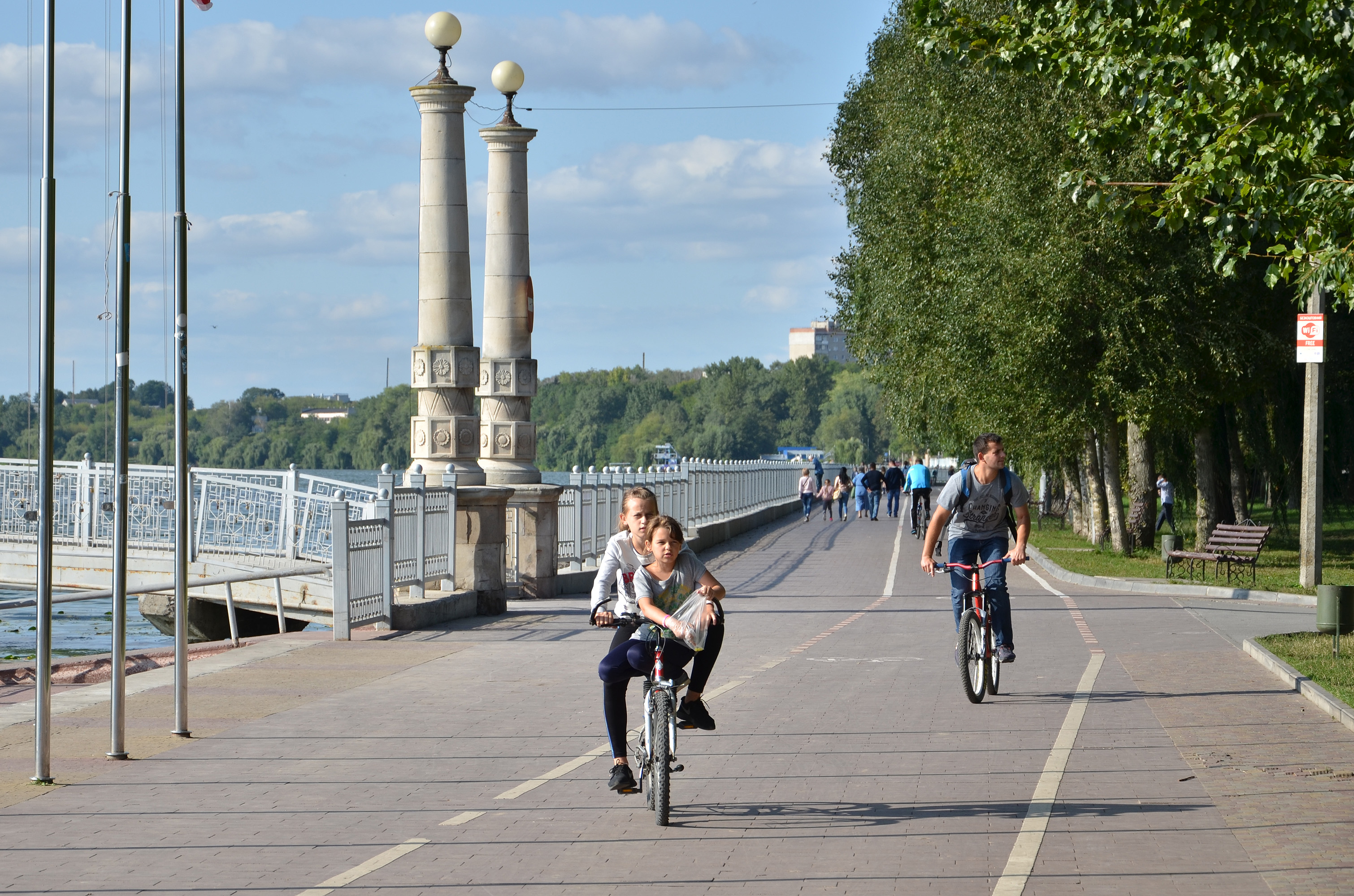 Тернопільські велосипедисти на велодоріжці в парку імені Тараса Шевченка.